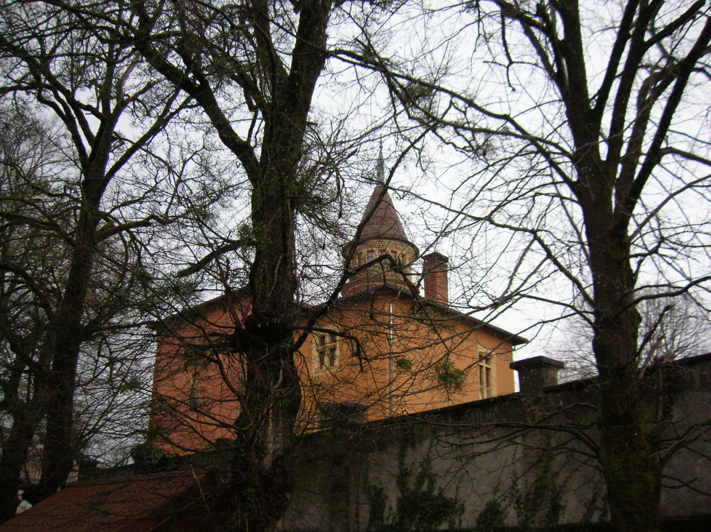 Château de la Veyrie, Bernin, Isère, France.